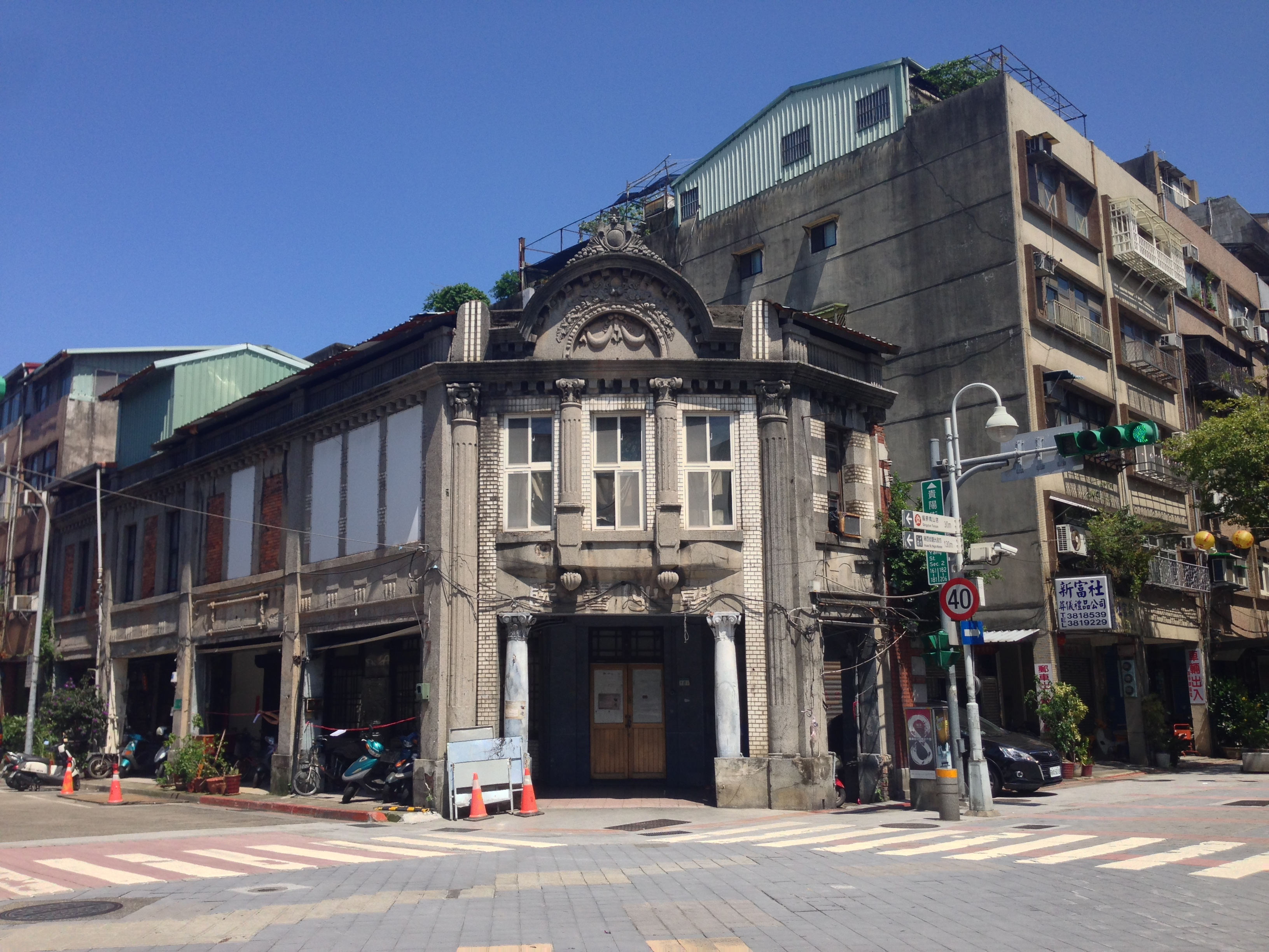 萬華朝北醫院